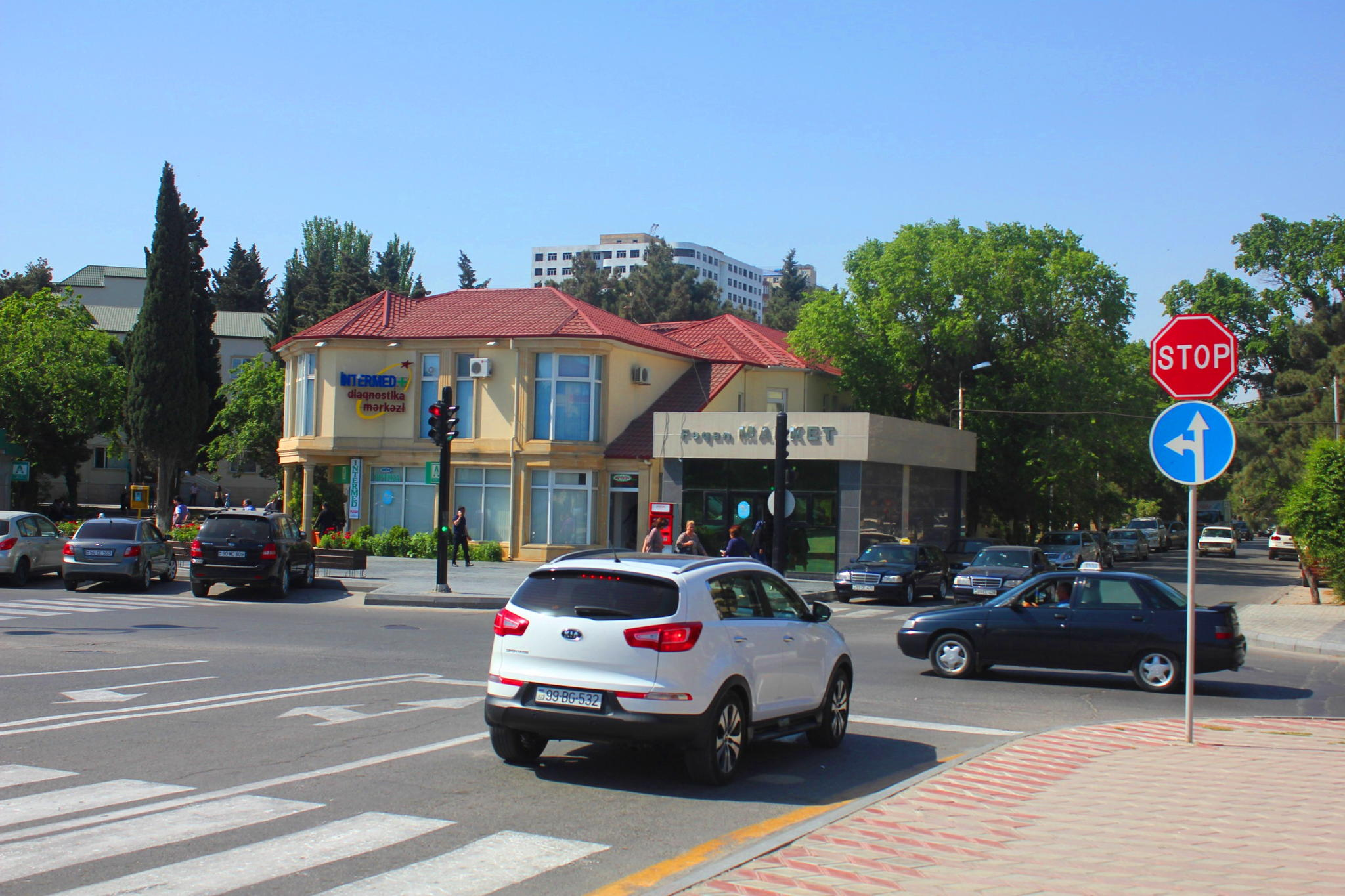 Sumqayıt şəhəri Heydər Əliyev prospekti ilə Lermontov küçəsinin kəsişməsi